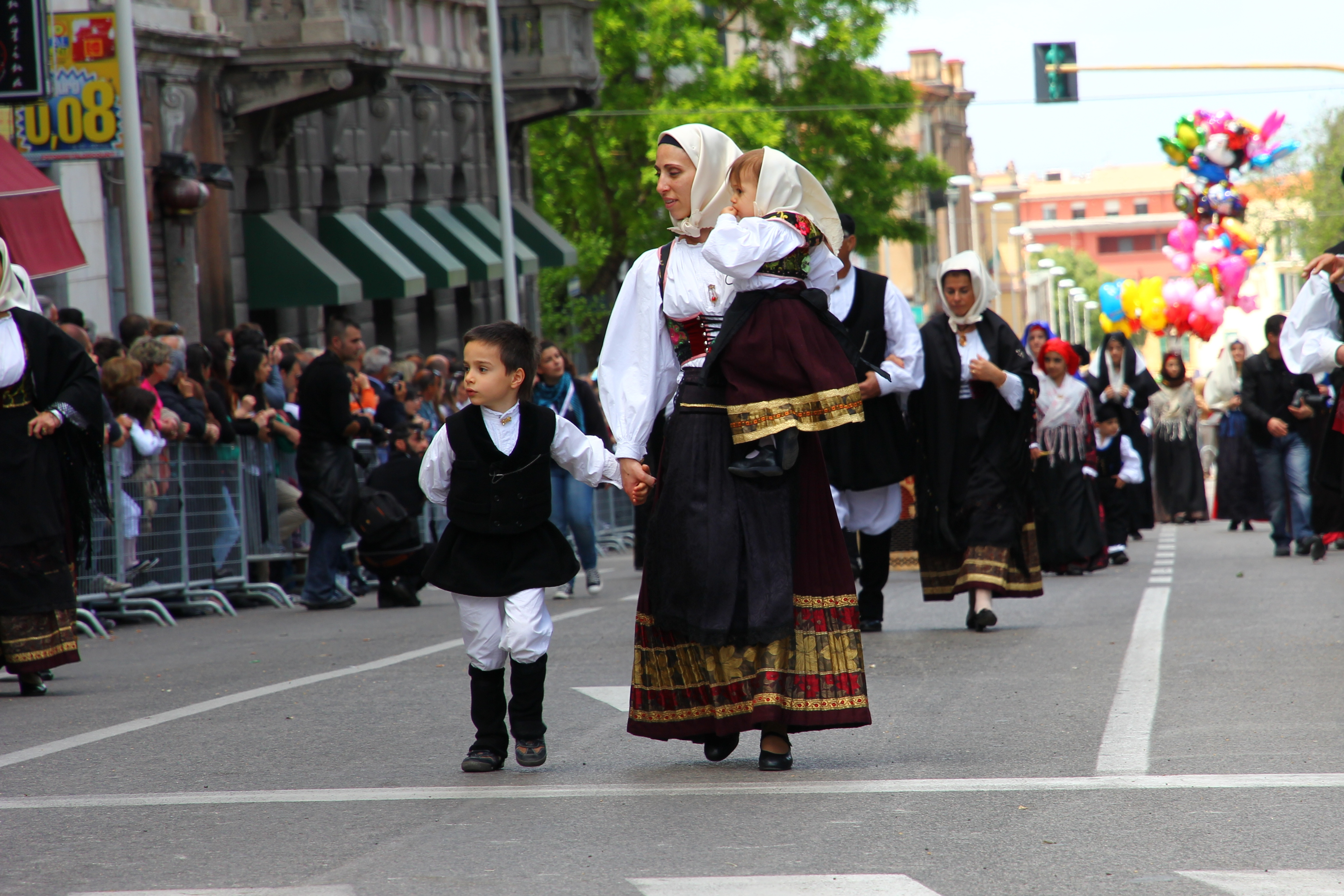 Cavalcata Sarda 2013 (Sassari)